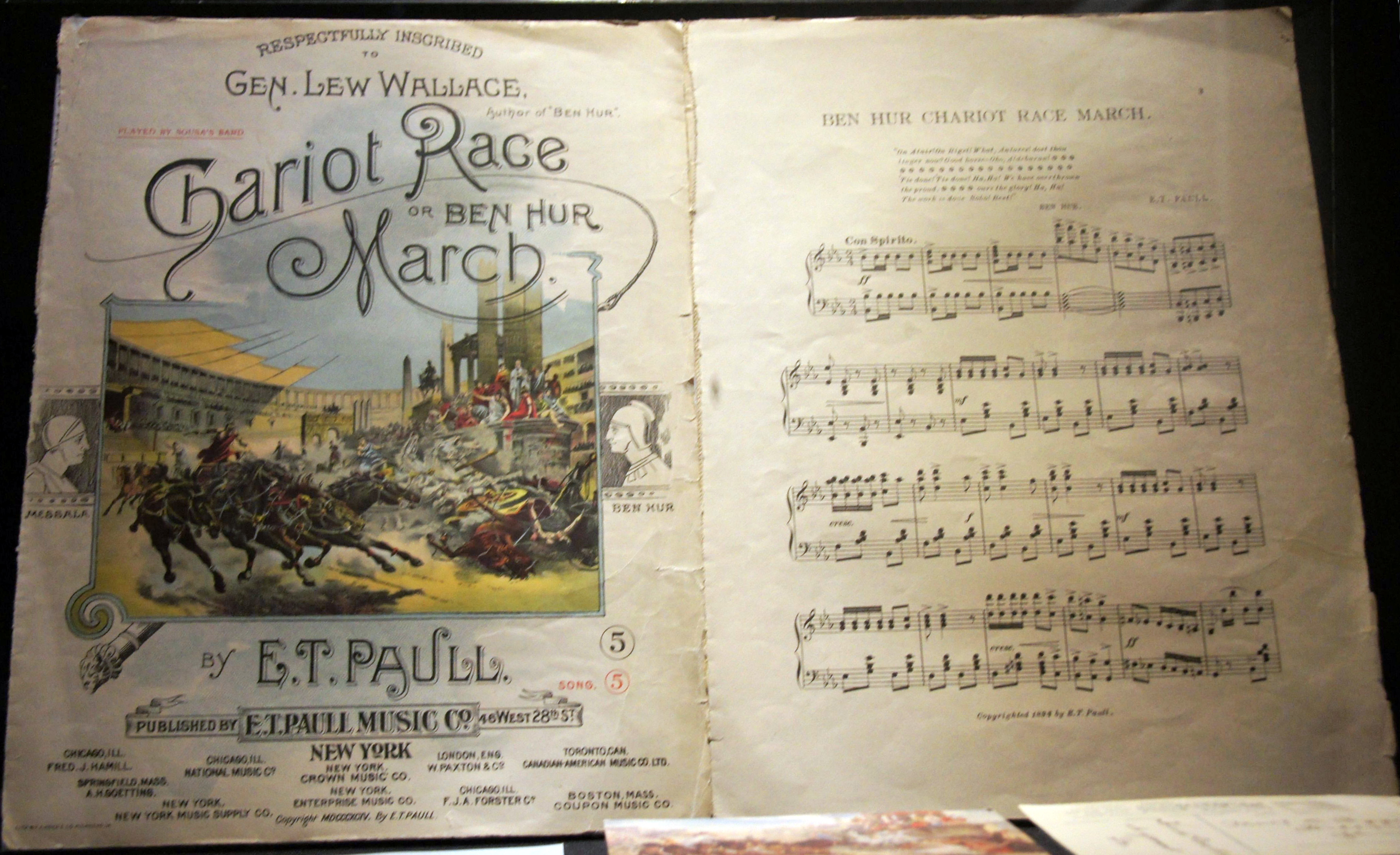 Edición de la partitura Chariot Race or Ben Hur March del compositor E. T. Paull, Nueva York, 1894, en la que aparece ya la obra de Ulpiano Checa "Carrera de carros romanos"